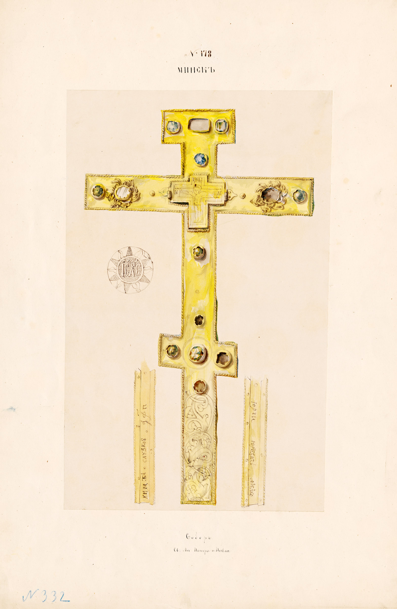 Беларуская (тарашкевіца): Менск (Miensk). Саборная царква Сьвятых Апосталаў Пятра і Паўла. Сяміканцовы крыж